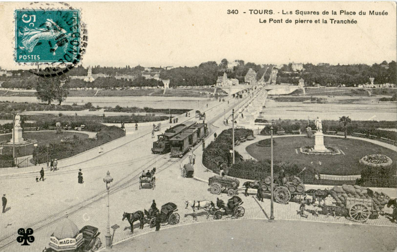 Carte postale éditée par MTIL, n°340Tours - Les squares de la Place du Musée - Le Pont de Pierre et la Tranchée